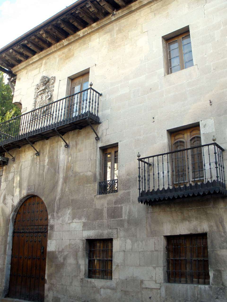 Casa Begoña, en Salvatierra-Agurain (Álava, País Vasco, España)